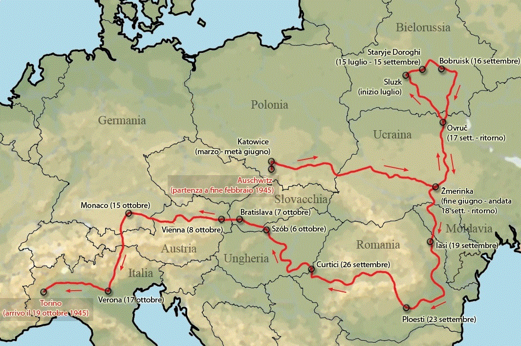 Cartina del percorso compiuto da Primo Levi da Auschwitz a Torino, raccontato nel libro "La tregua" (1963); i confini degli stati sono quelli odierni.